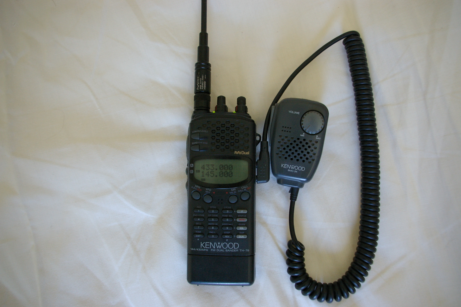 Transceiver & Hand set,KENWOOD TH-79.